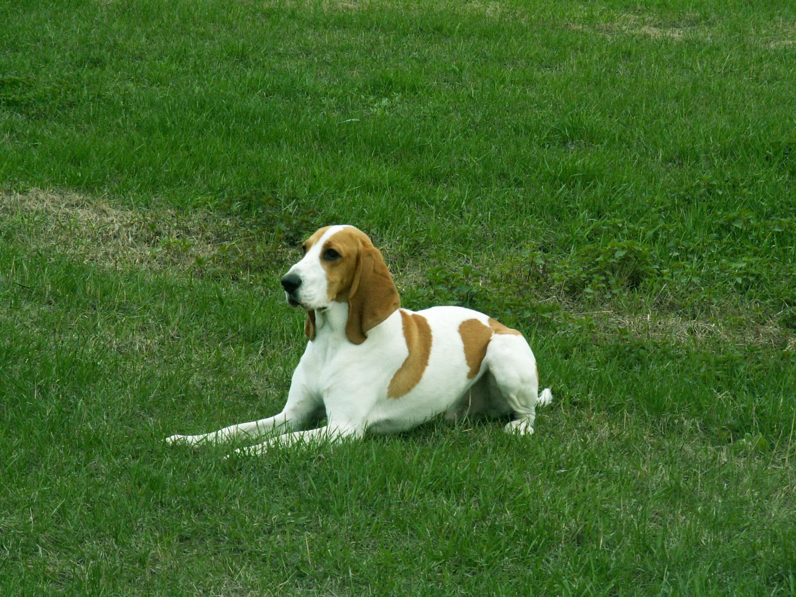 Schweizer Laufhund/Swiss Hound Variety: Schwyzer Laufhund/Schwyz Hound - Dryas Olaska (his website in english).